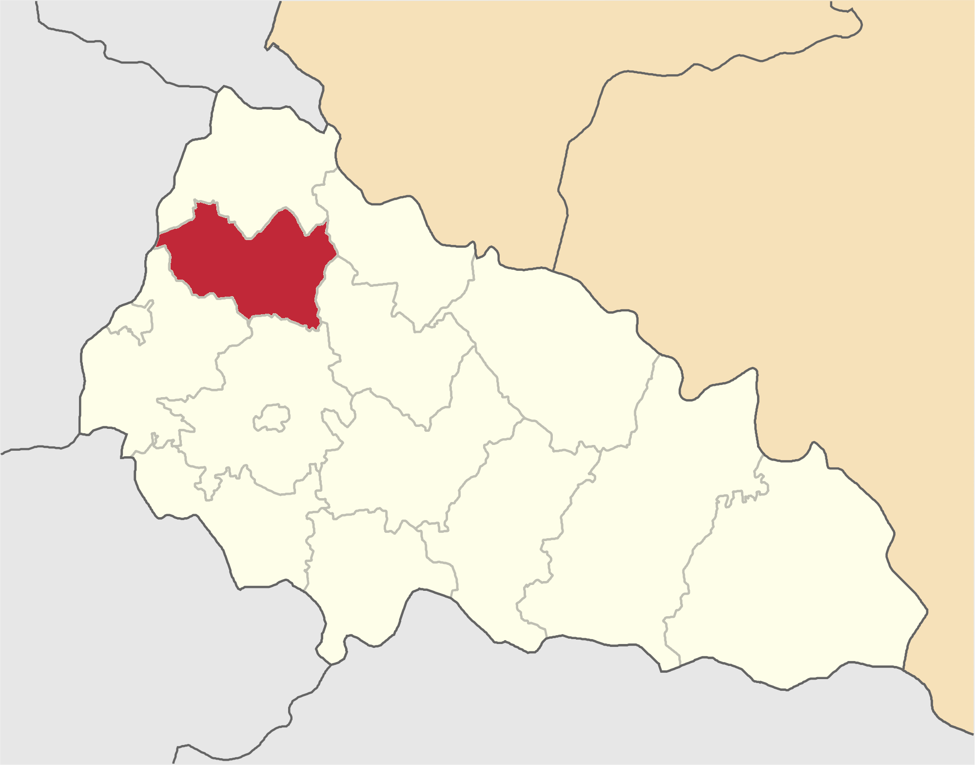 Perechynskyi-Raion map